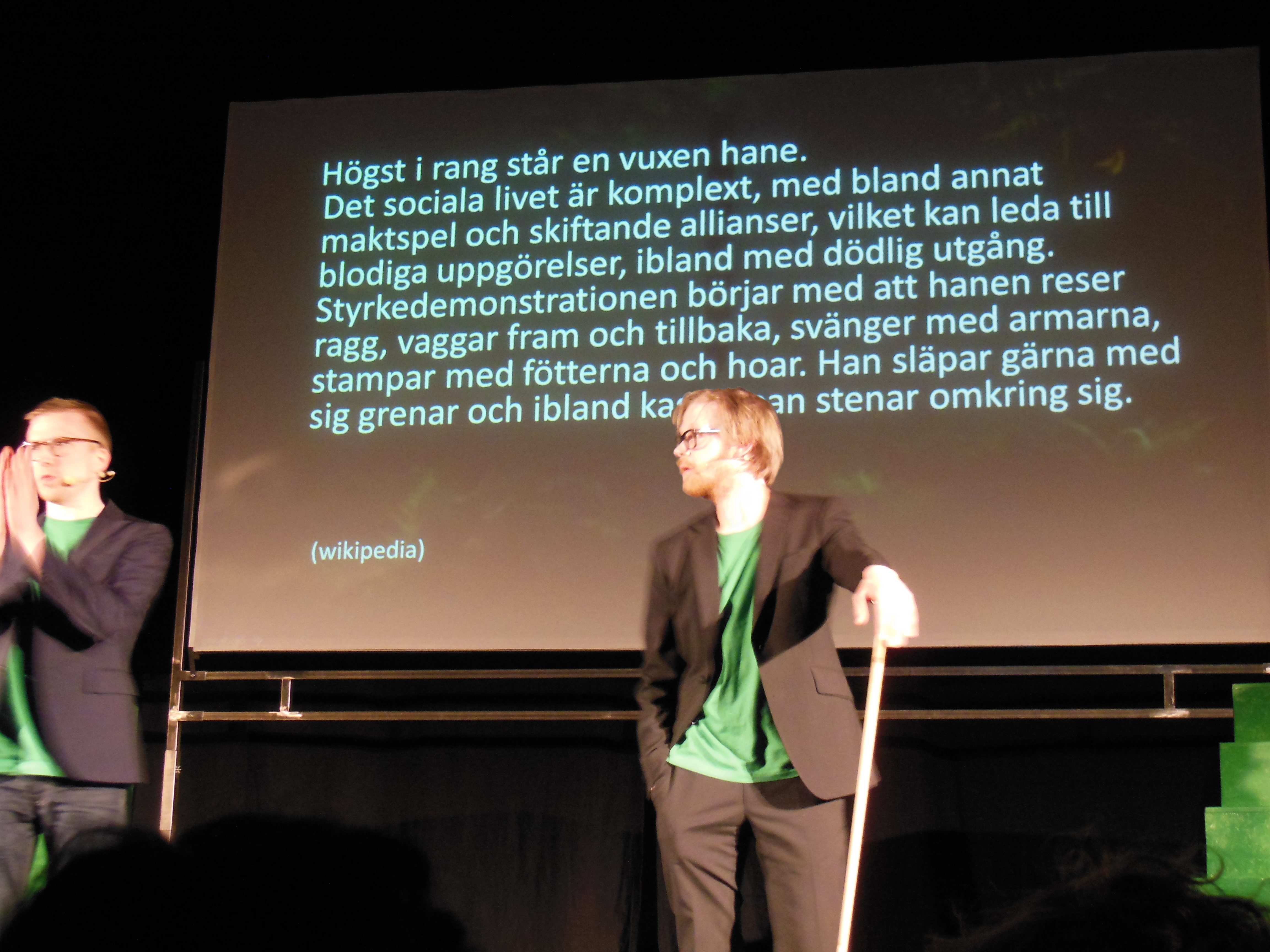 Anders Johansson och Måns Nilsson i showen Primater med topplån, här med ett citat från Wikipediaartikeln Schimpans.